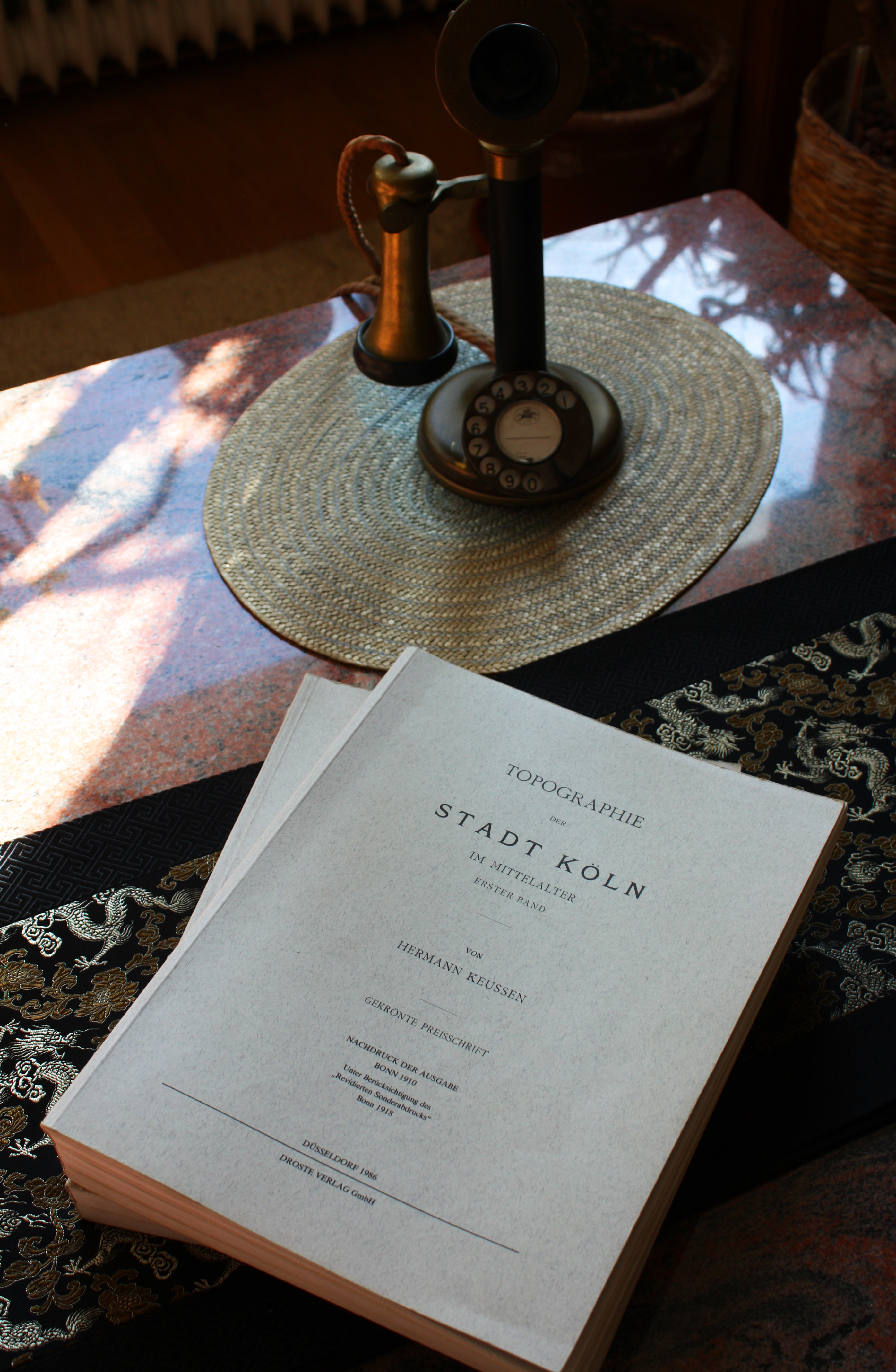 Illustration zum Artikel Hermann Keussen und seinem Werk der Topographie der Stadt Köln im Mittelalter , 1910